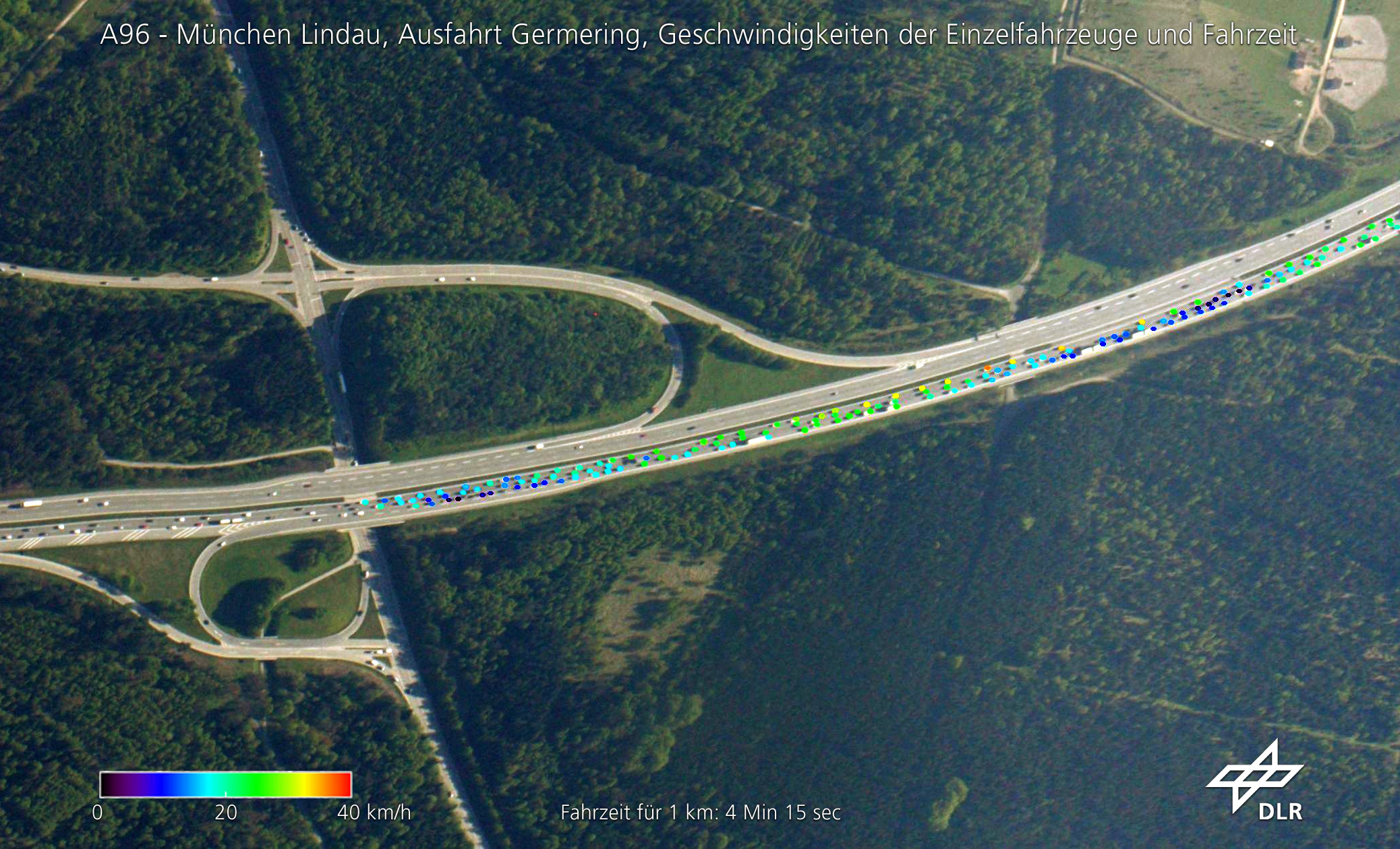 A 96, Ausfahrt Germering, Stau auf der A96 (Lindau-München) mit berechneter Reisezeit. Dieses Bild wurde im Rahmen der DLR/ADAC-Kampagne zum großflächigen Verkehrsmonitoring zur Erfassung von Stauzeiten aus digitalen Serienbildern erstellt.